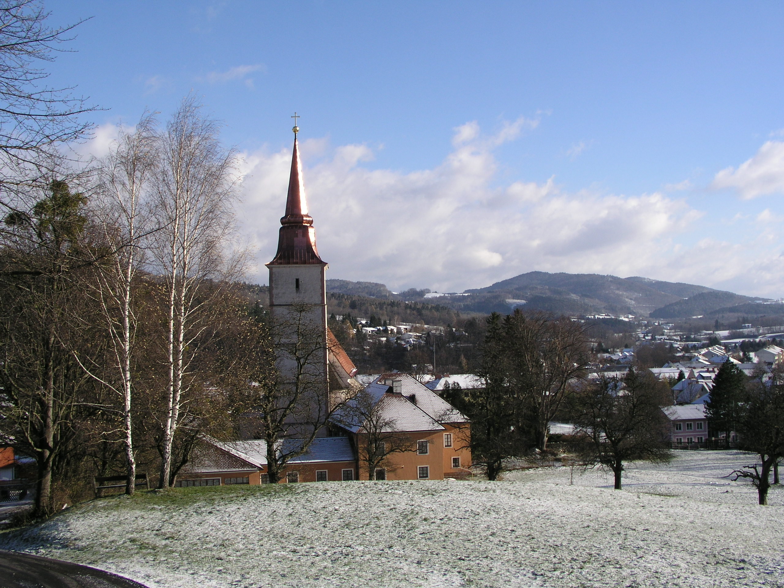 Stadtpfarrkirche Hainfeld